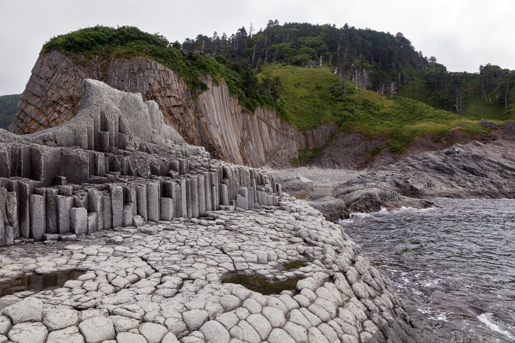 Курильский заповедник: Южно-Курильский городской округ, Сахалинская область This image is related to the protected area of Russia number 6500090